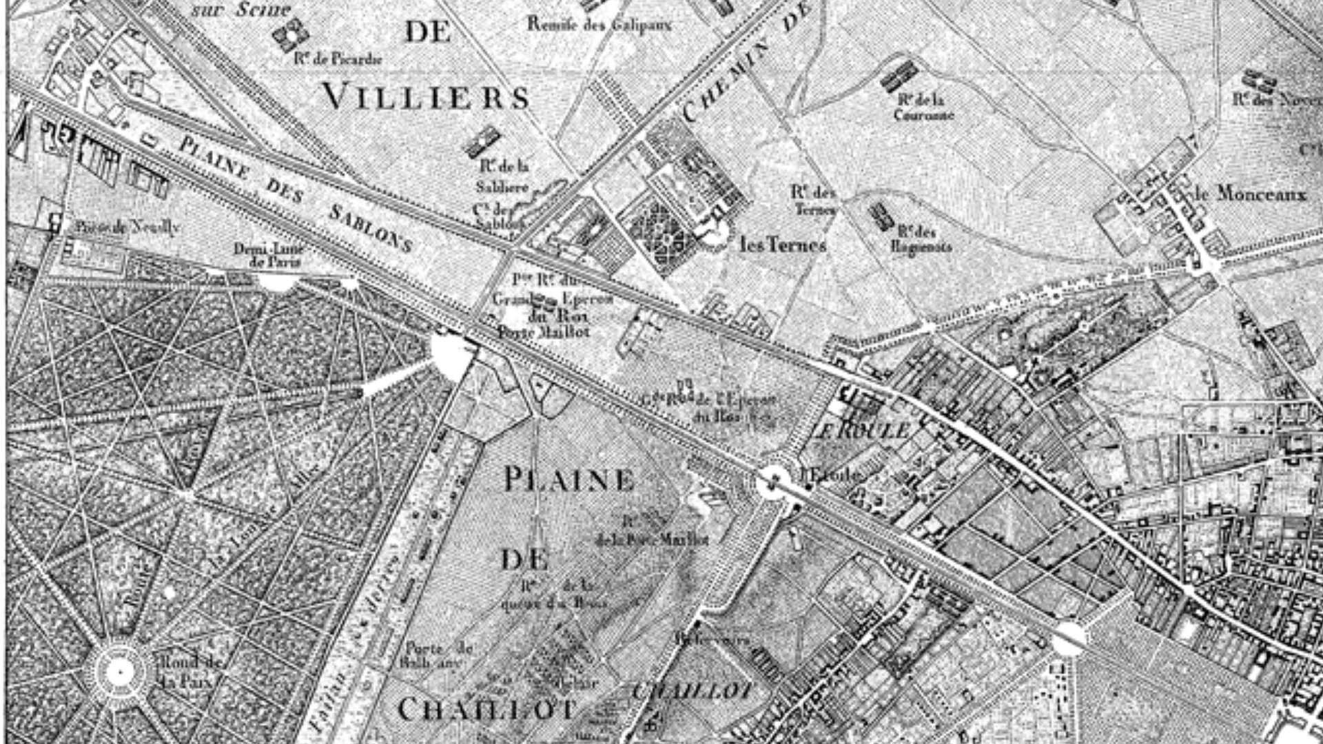 extrait de :Carte topographique des environs de Versailles dite des Chasses Impériales, levée et dressée de 1764 à 1773 par les ingénieurs géographes des Camps et Armées, commandés par feu M. Berthier, Colonel, leur chef ; terminée en 1807 par ordre de Napoléon, Empereur des Français, Roi d'Italie et Protecteur de la Confédération du Rhin, pendant le Ministère de S.A.S.M. le Maréchal Alexandre Berthier, Prince de Neuchatel, Grand-Veneur, Grand Aigle de la Légion d'Honneur, etc. etc., sous la direction du Général de Division Sanson / Gravé par Doudan, Tardieu l'ainé et Boudet Auteur : Berthier, Alexandre (1753-1815). Auteur du texte Auteur : Sanson, Nicolas-Antoine (1756-1824). Auteur du texte Auteur : Houdan, François d' (1748-1828). Graveur Auteur : Tardieu, P.F. (17..-18.. ; graveur vers 1788). Graveur Auteur : Boudet (17..-18.. ; graveur). Graveur Auteur : France. Dépôt de la guerre. Éditeur scientifique Éditeur : Dépôt de la Guerre (Paris) Date d'édition : 1807 Sujet : Chasse Sujet : Versailles -- Environs Type : document cartographique,carte,image fixe